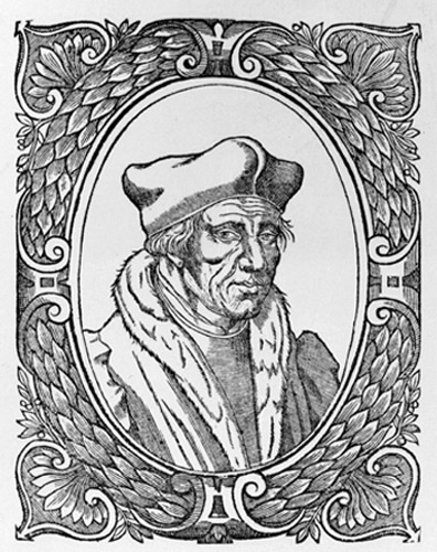 extraite des Vrais Portraits des hommes illustres en piété et en doctrine de Théodore de Bèze